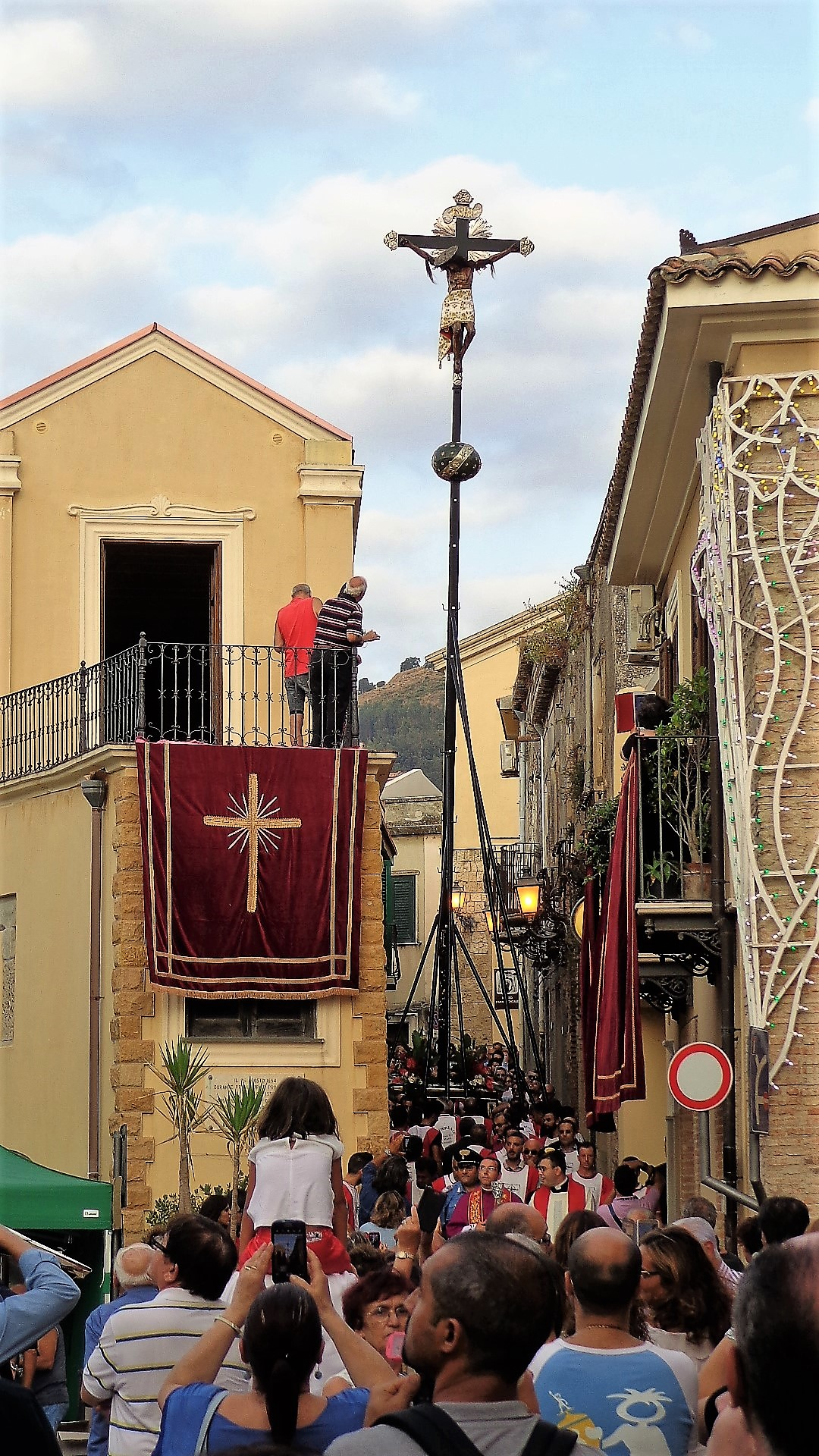 Fase della processione d'agosto